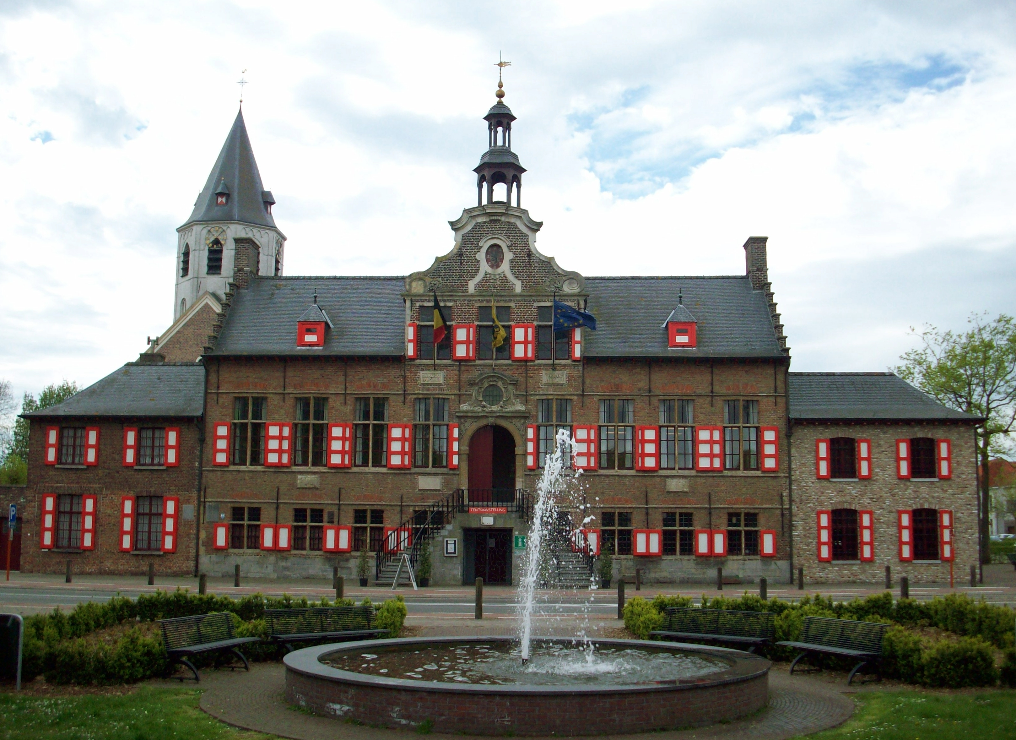 Stadhuis en kerk van Kaprijke